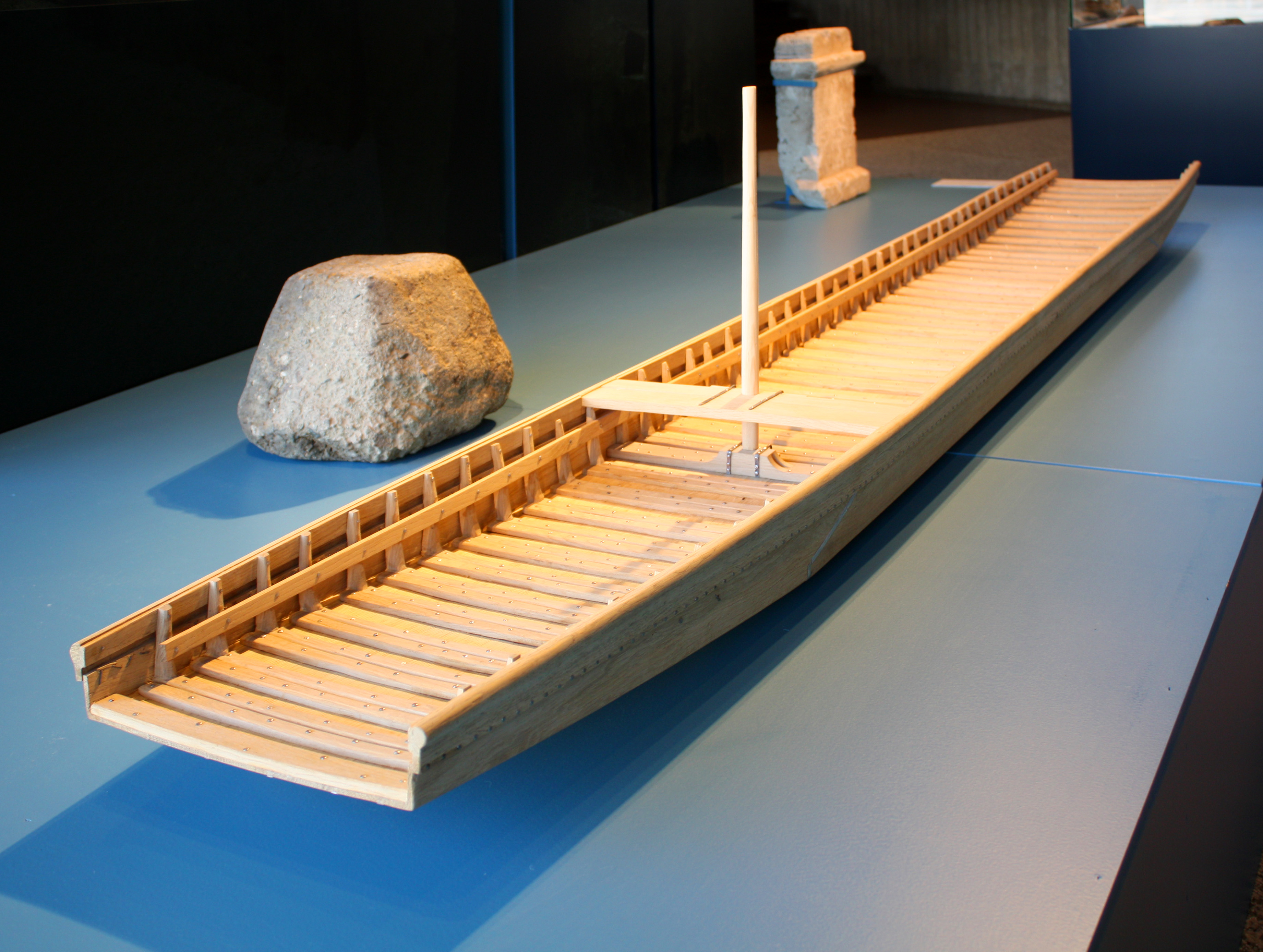 Modell eines römischen Transportschiffes vom Alter Markt in Köln (Maßstab 1:10). Bei Schachtarbeiten während des Baues einer neuen U-Bahntrasse wurde 2007 auf dem Boden des römischen Hafens in 13 Metern Tiefe das Teilstück eines römischen Transportschiffes gefunden. Die erhaltene Fläche von sechs qm aus Eichenbohlen erlaubte die Rekonstruktion eines Plattbodenschiffes von ehemals über 20 Meter Länge. Der lateinische Name solcher Schiffe ist noch unbekannt. Die Schiffe waren lebensnotwendig für die Versorgung der römischen Stadt Köln. Sie dienten dem Transport von Schlachtvieh, Getreide, Gemüse, Brennholz, Bauholz und Bausteinen. Das Kölner Schiff, das bislang älteste Beispiel, sank um die Mitte des 1. Jahrhunderts n. Chr. Archäologen des Schifffahrtsmuseums Mainz konservieren die originalen Eichenplanken. Die Rekonstruktion folgt verschiedenen Schiffsfunden dieses Typs. Begleittext und Ort der Ausstellung: Römisch Germanisches Museum in Köln.